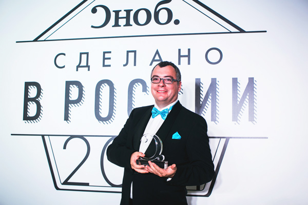 Вручение премии «Сделано в России»